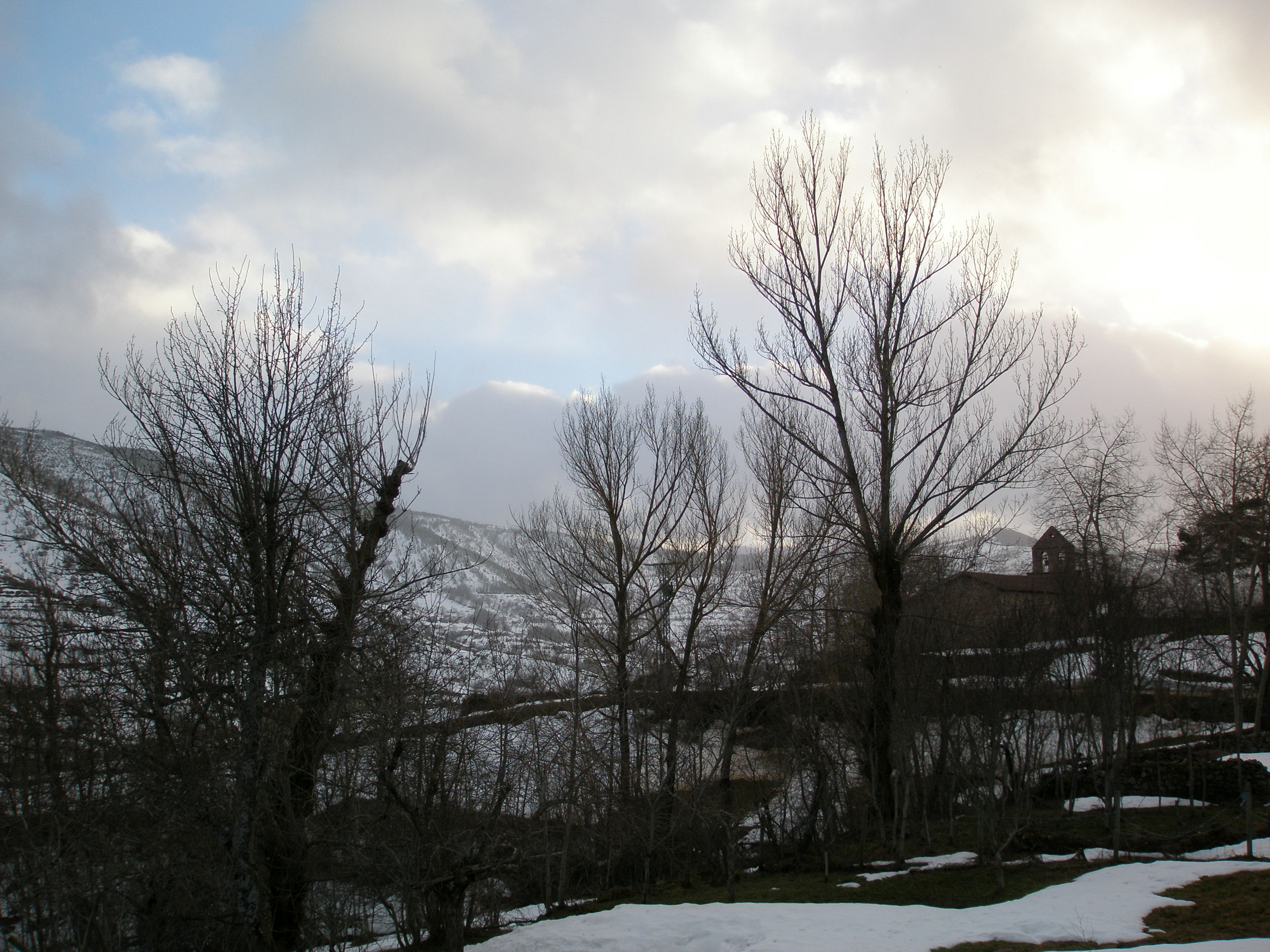 Iglesia de Arintero en Invierno